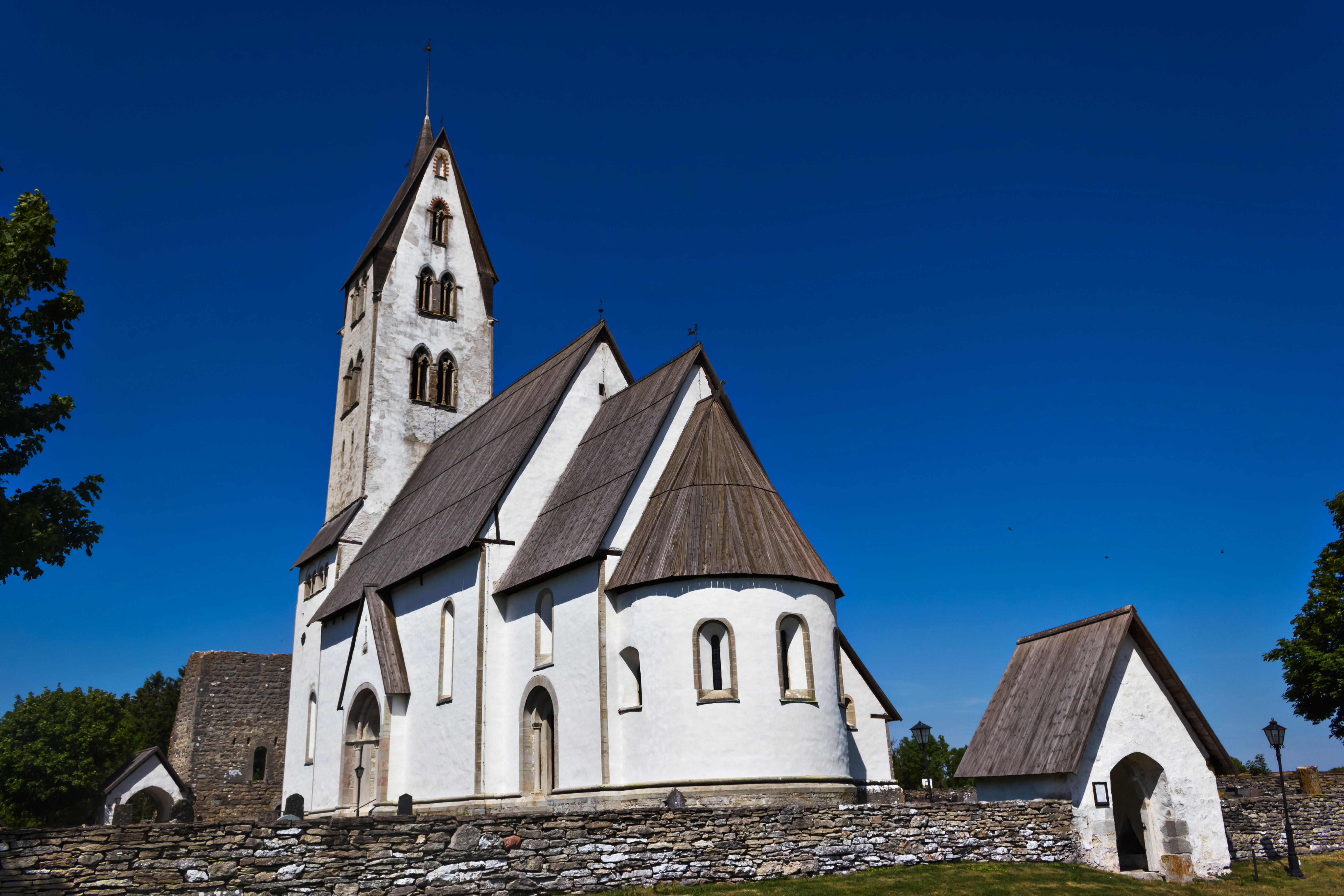 Igrexa de Gothem, na illa sueca de Gotland.